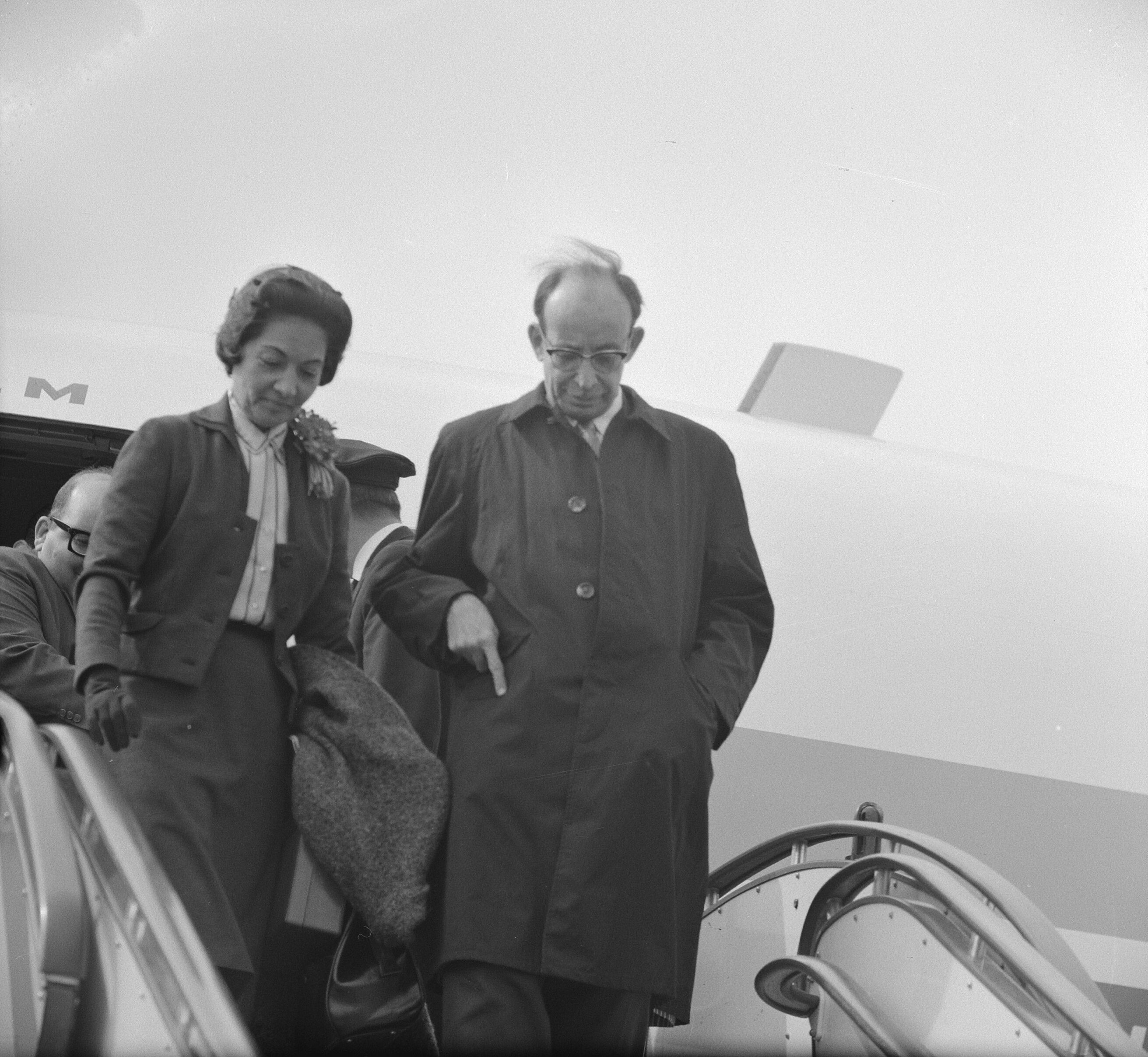 Collectie / Archief : Fotocollectie Anefo Reportage / Serie : [ onbekend ] Beschrijving : Aankomst Raul Roa op Schiphol. Raul Roa , zijn vrouw op vliegtuigtrap Datum : 1 juni 1961 Trefwoorden : aankomsten, vliegtuigtrappen, vrouwen Persoonsnaam : Roa, Raul Fotograaf : Nijs, Jac. de / Anefo Auteursrechthebbende : Nationaal Archief Materiaalsoort : Negatief (zwart/wit) Nummer archiefinventaris : bekijk toegang 2.24.01.03 Bestanddeelnummer : 912-5560